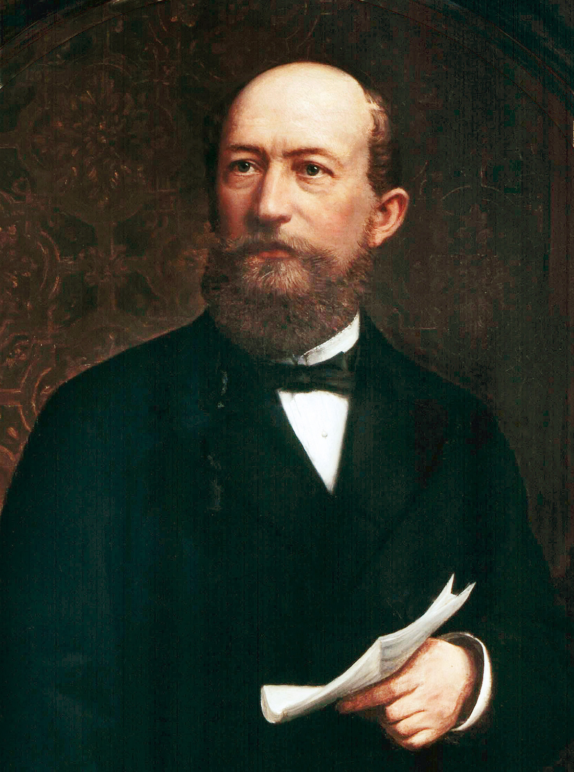 Friedrich Bayer (* 6. Juni 1825 in Barmen-Wichlinghausen; † 6. Mai 1880 in Würzburg)